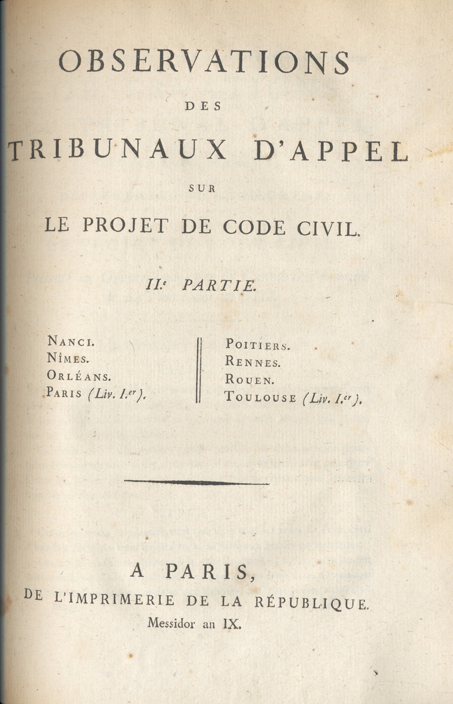 Observations des Tribunaux d'Appel sur le projet de Code civil (II partie)